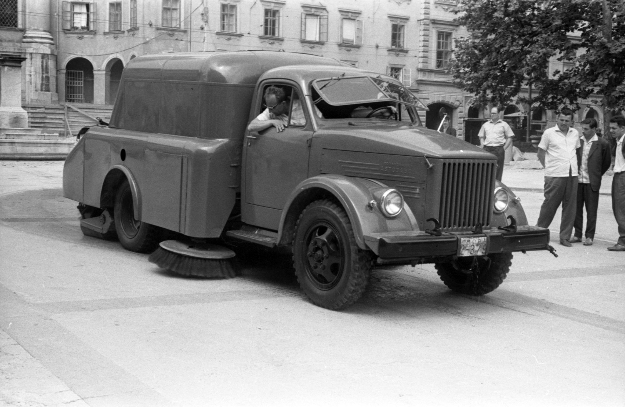 Avtomobil za pometanje cest v Ljubljani